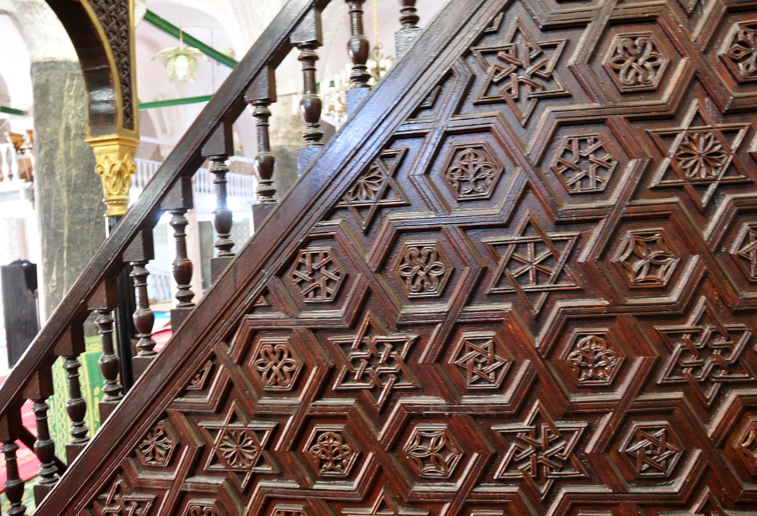 chaire de mosquée Sidi Elmorjeni